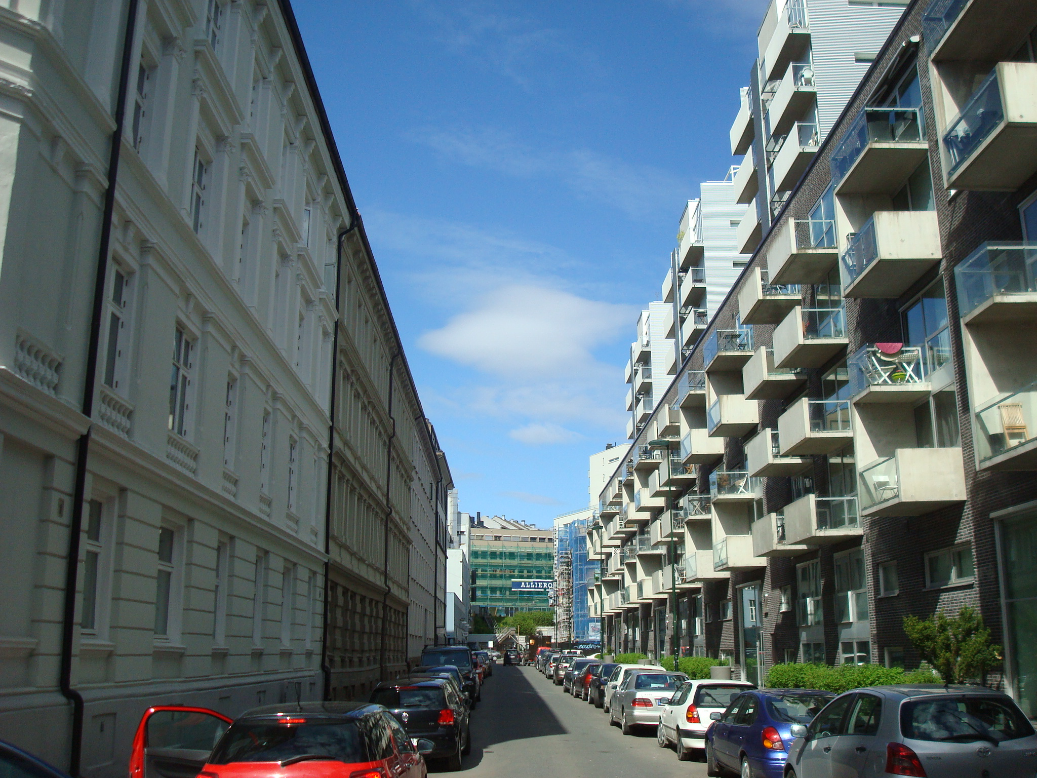 Hauchs gate i Oslo. Sett oppover mot Waldemar Thranes gate.